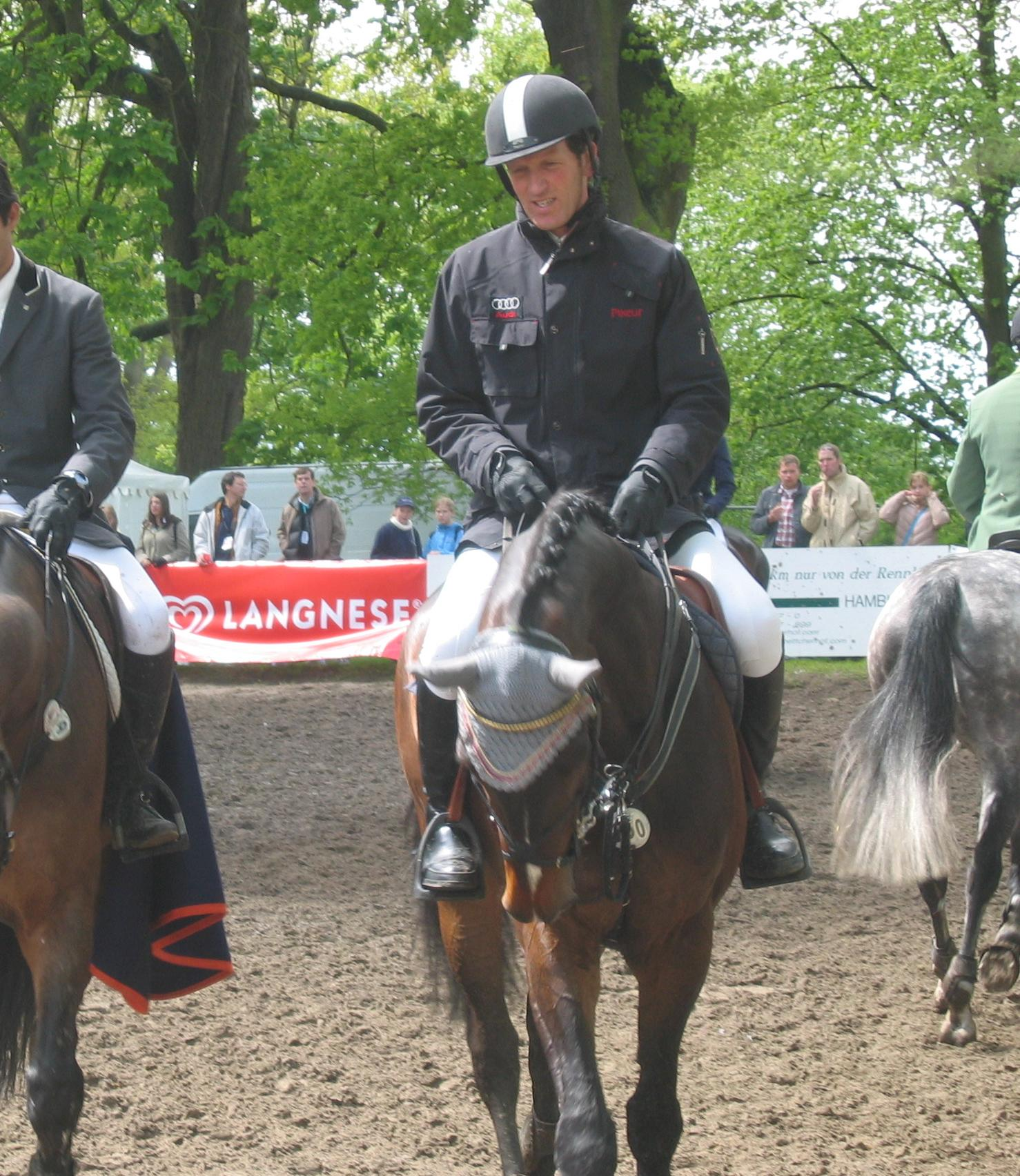 Ludger Beerbaum auf seinem Nachwuchspferd "Enorm", Fotografiert am 07.05.2005 in Hamburg, Klein Flottbek, Aufgenommen mit: Canon Digital IXUS 400 (Hier ein Ausschnitt des Originalbildes)